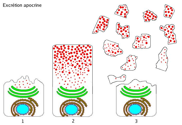 Schéma en trois temps (repos, mise en charge, excrétion) du méanisme d'excrétion apocrine. Fait par Solitchka, 2005